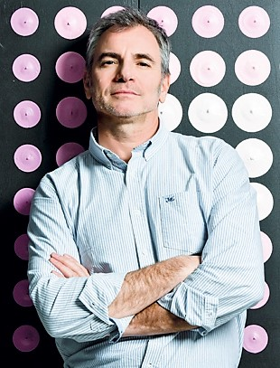 Actor Chileno